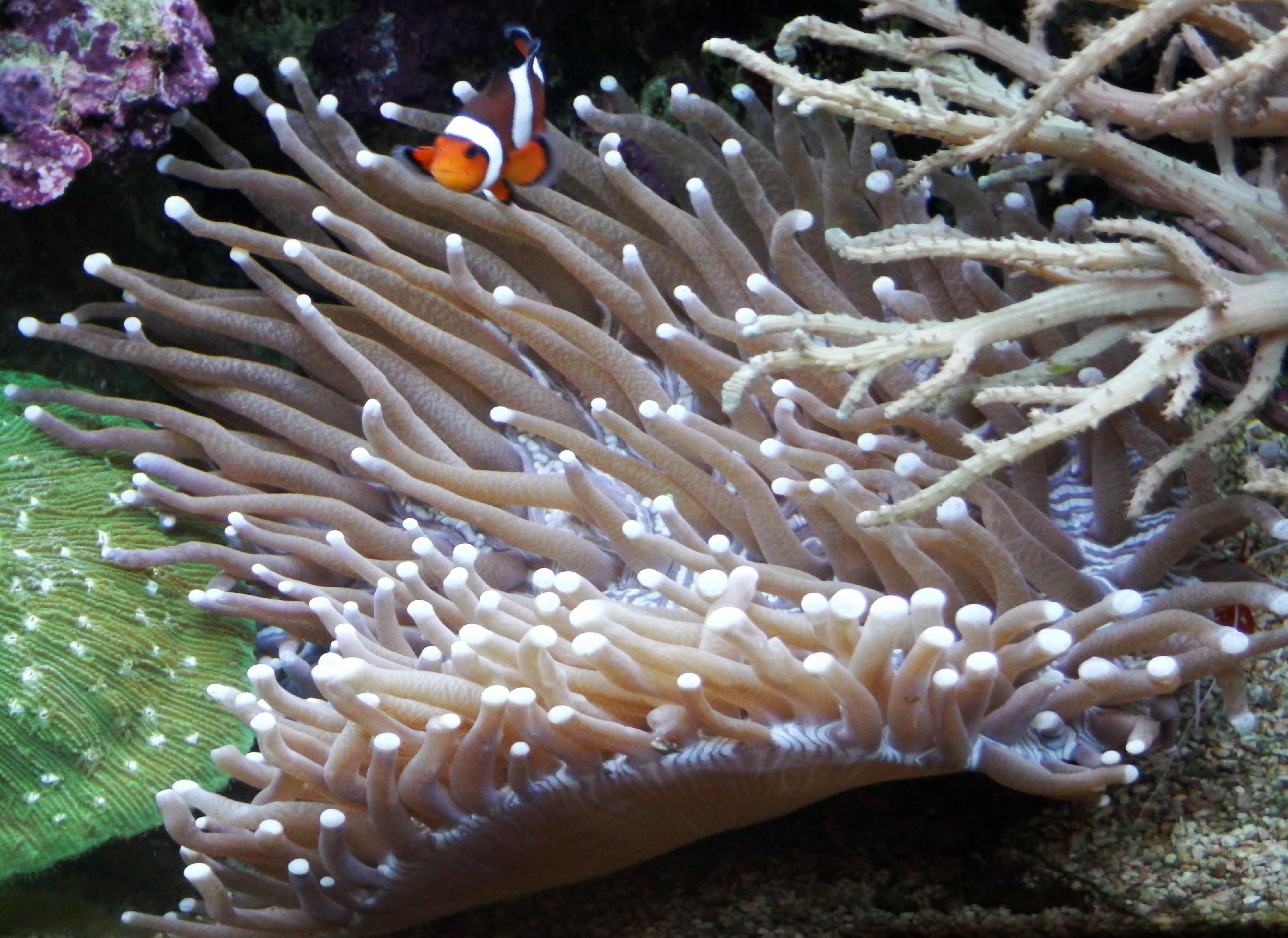 Amphiprion ocellaris entre Heliofungia actiniformis, derecha Sinularia flexibilis, izquierda abajo Halomitra pileus, acuario de arrecife